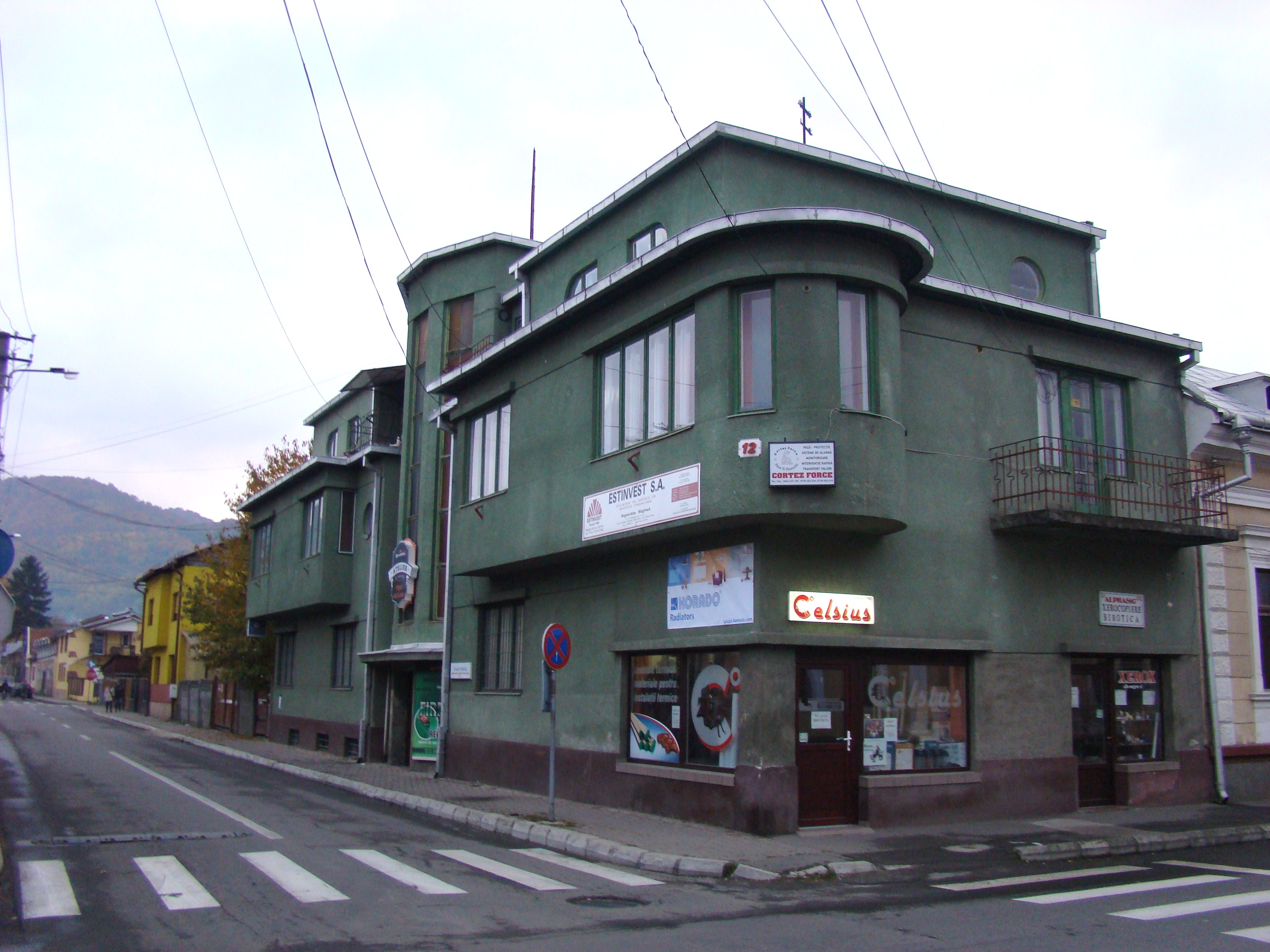 Casa Darvay, municipiul Sighetu Marmației, Str. Eminescu Mihai 12